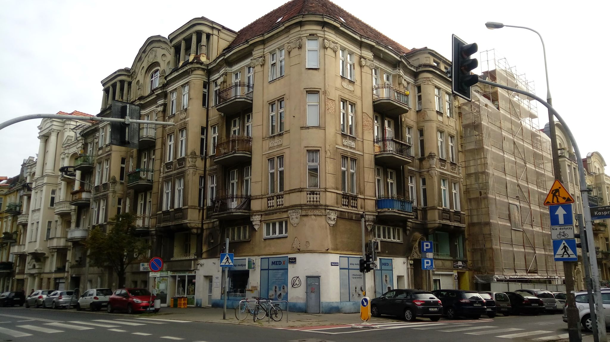 Kamienica przy ul. Niegolewskich w Poznaniu, w której mieszkały Bożena Stelmachowska i Wanda Brzeska